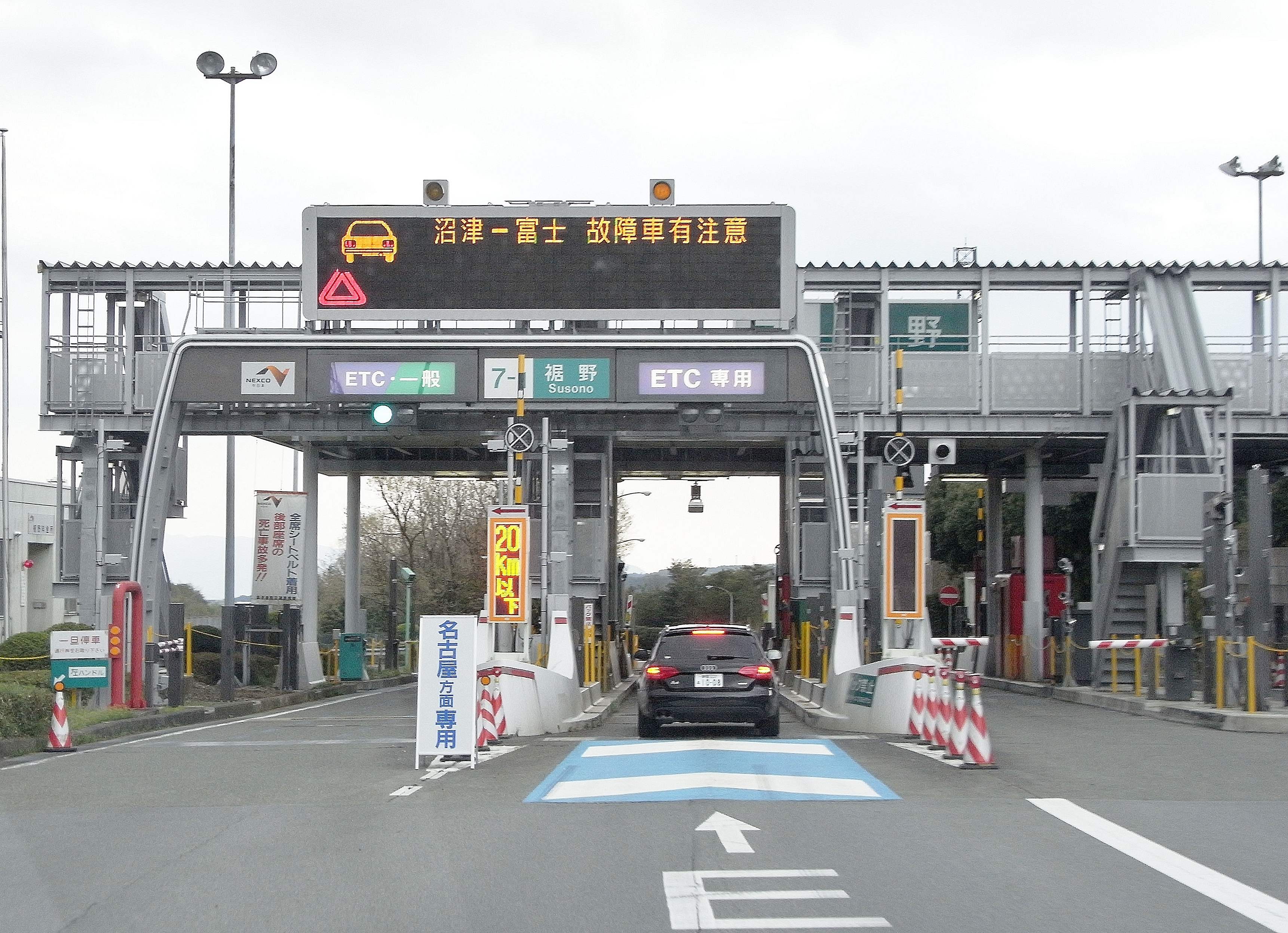 東名高速道路裾野IC、下り線ブース